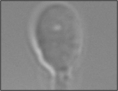 IMSI X6000 Cabeza: 4.75 micras de largo, 3.28 de ancho Vacuola: No presentar vacuola o una 0.78 micras de diámetro.